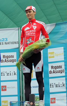 Georg Preidler sul podio in Toscana (Coppa delle Nazioni U23)